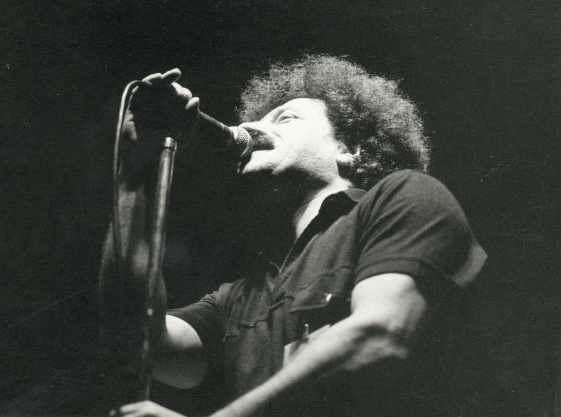 Rock maraton - "Ž.A.Čičak - uz malu pomoć mojih prijatelja"- Zetra 14.oktobar 1989. Sarajevo